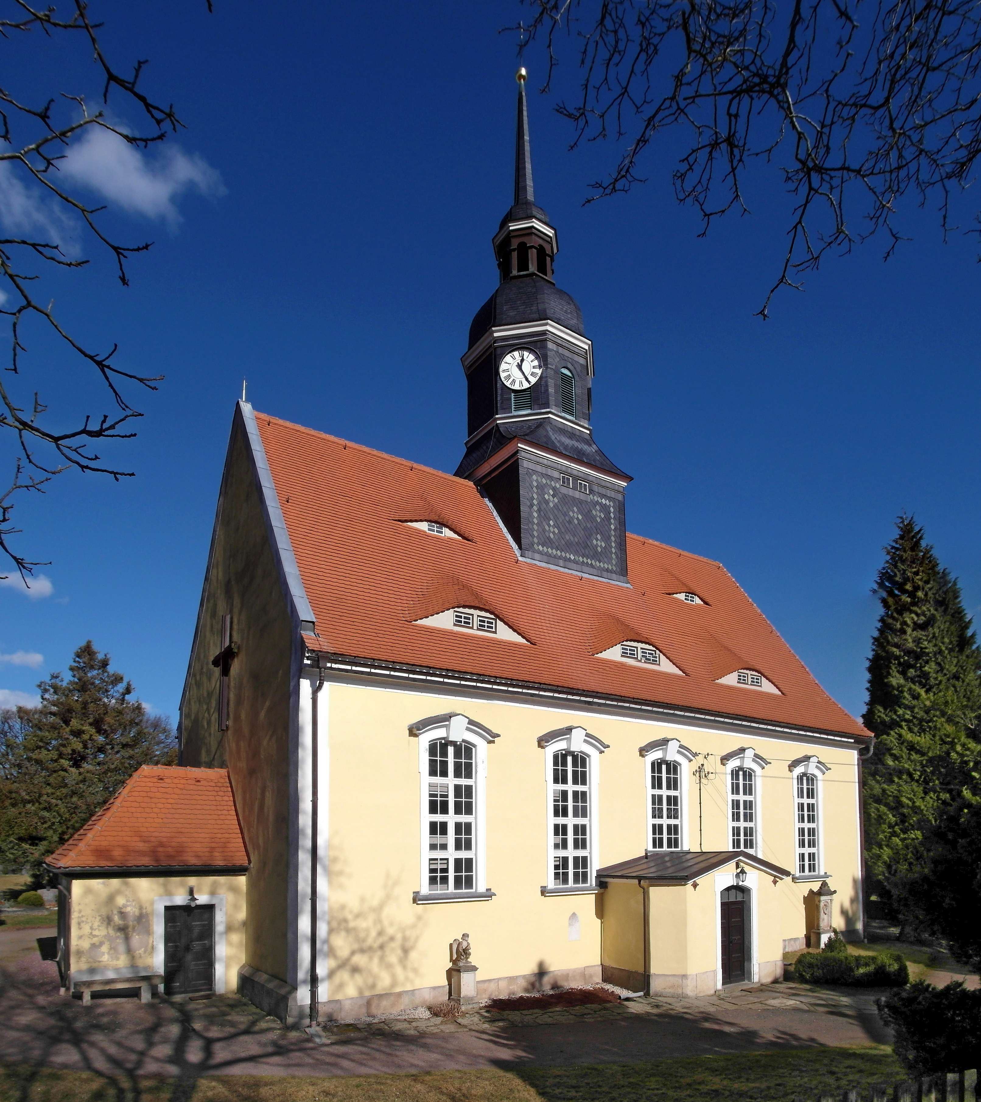 23.02.2014 01705 Somsdorf (Freital): Georgenkirche (GMP: 50.976377,13.603617) an der Höckendorfer Straße. Barocke Dorfkirche aus dem 18. Jahrhundert, deren Vorgängerbau bereits 1238 in Somsdorf geweiht worden sein soll. [SAM1862+1865.JPG]20140223110MDR.JPG(c)Blobelt